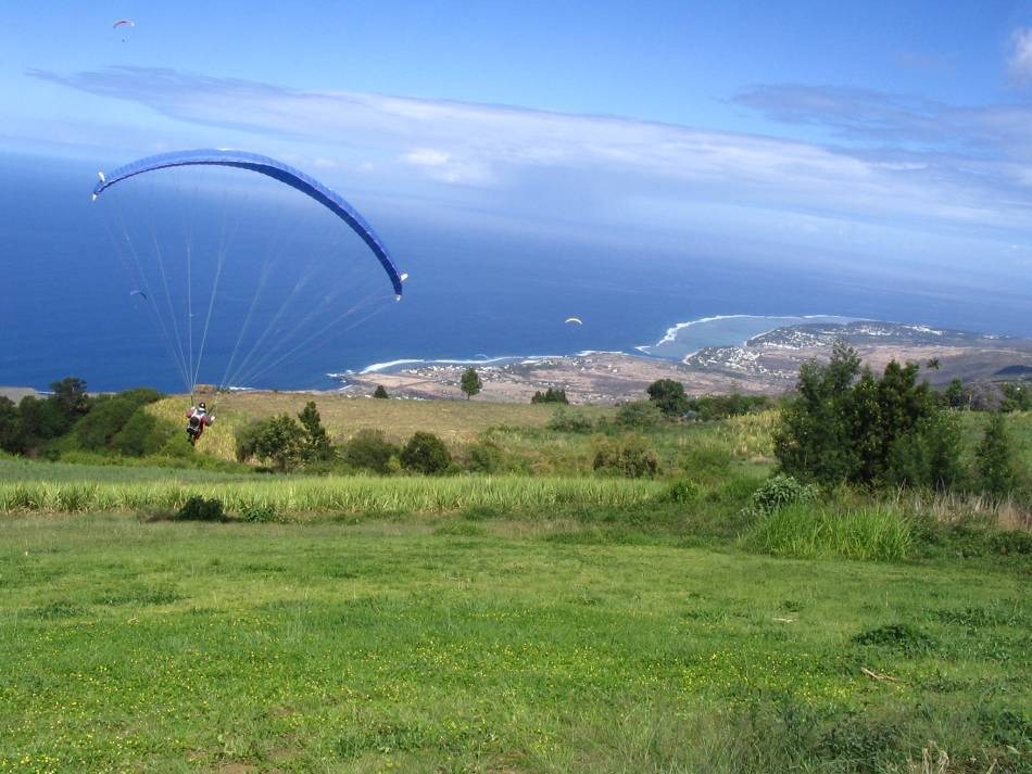 Photo prise par Nerijp en novembre 2004. Elle est libre de droit d'après cette page.